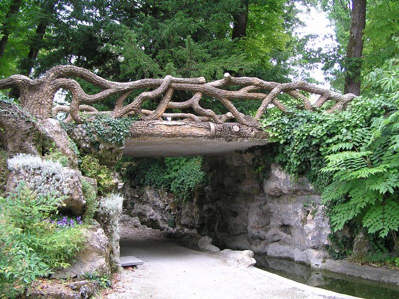 jardin public:grotte